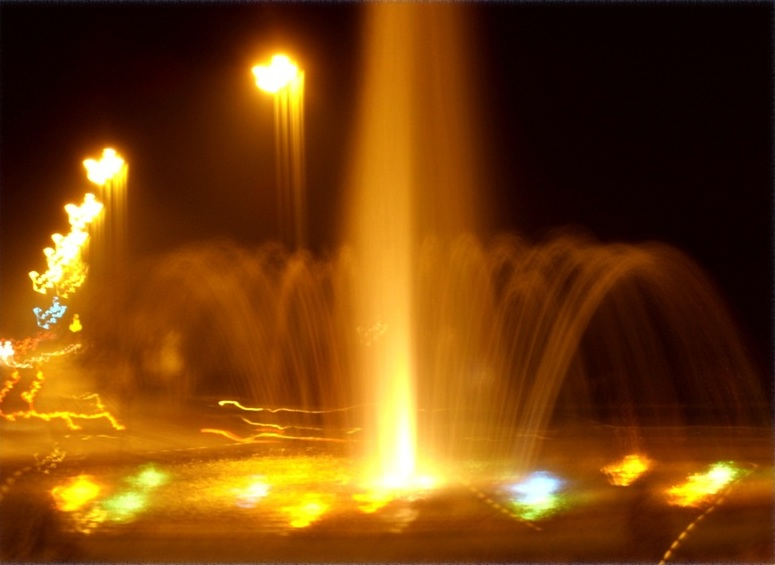 Vodoskok u ulici Matije Gupca